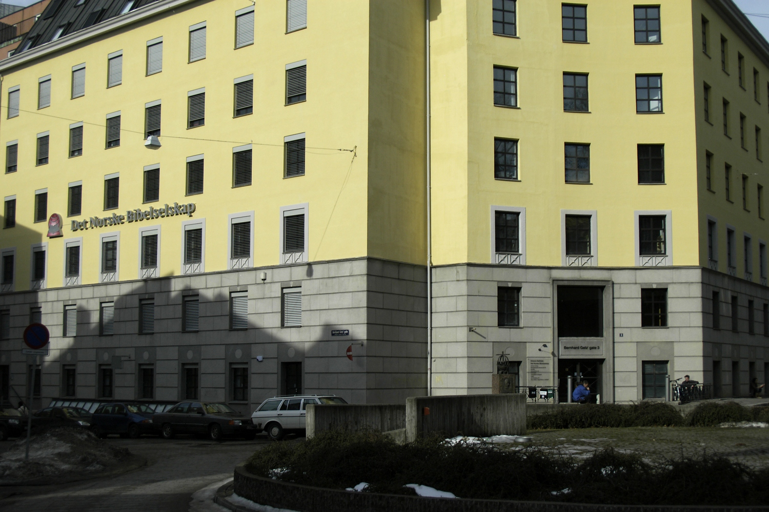 Bibelselskapets og Kirkens Nødhjelps bygning i Bernhard Getz' gate 3 (ved Kommandør T. I. Øgrims plass). Arkitekt: Knut Knutsen (1938).